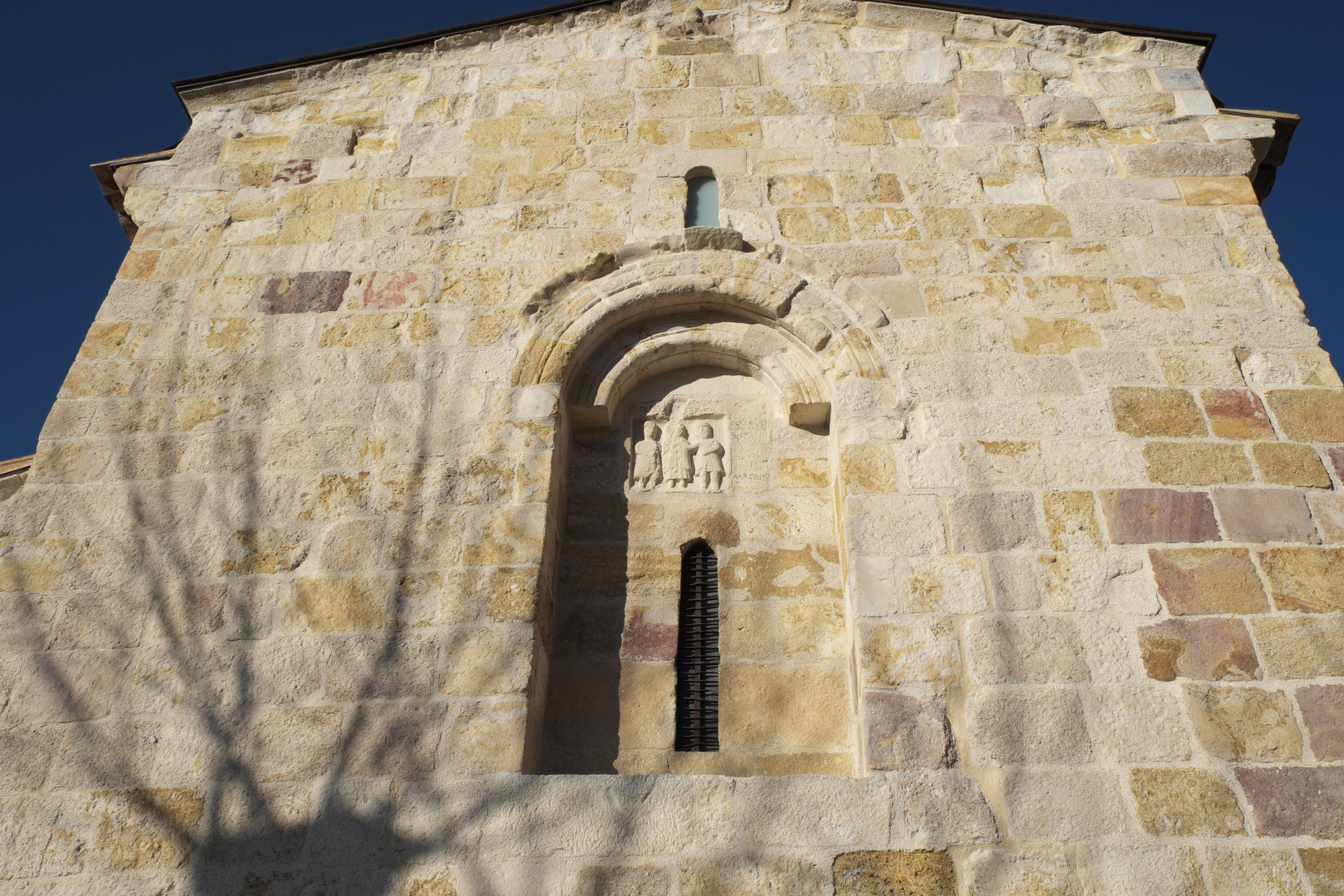 Kirche San Cipriano in Zamora (Kastilien-León/Spanien), Rundbogenfenster mit Reliefplatte